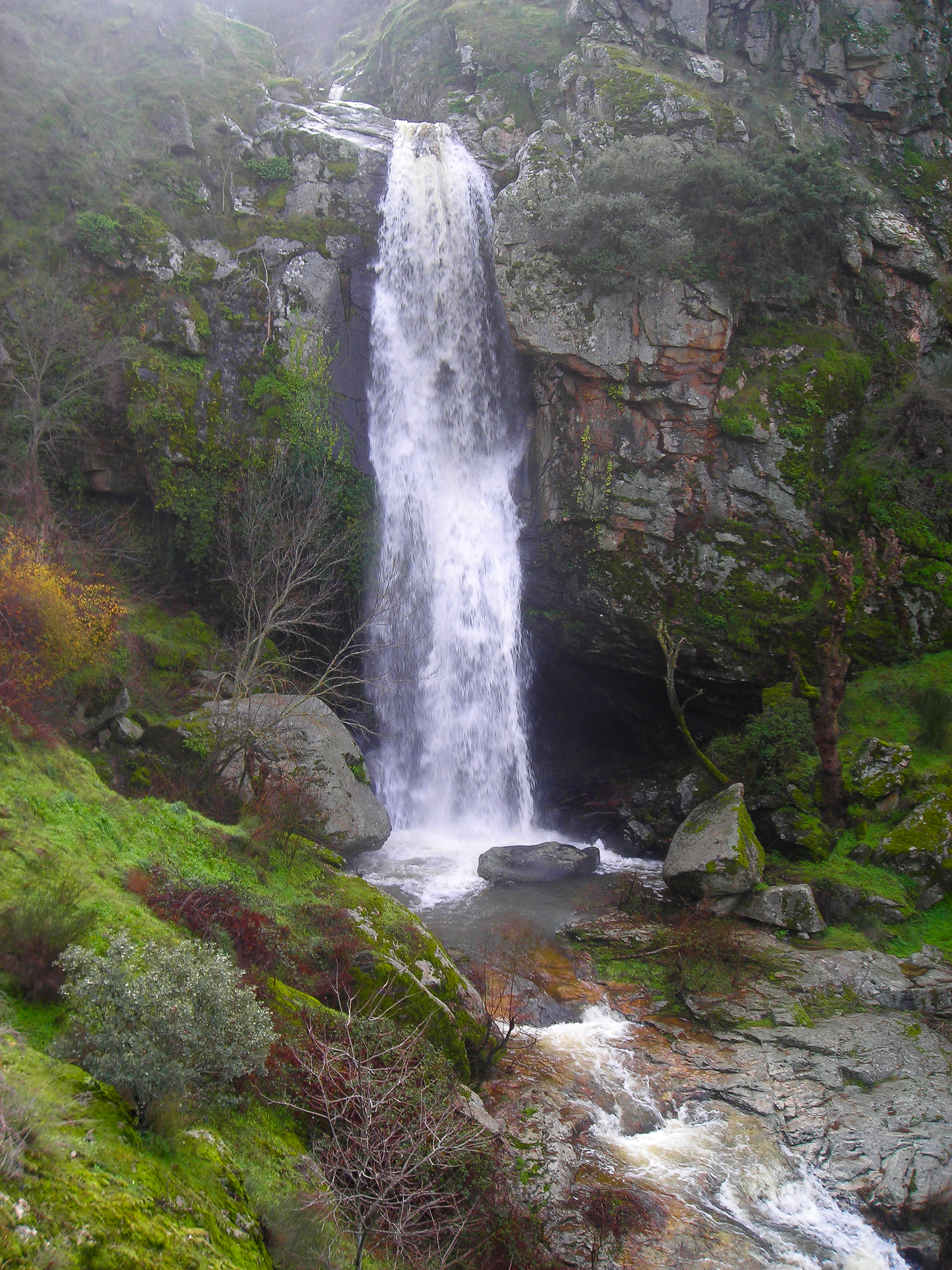 cascada que tiene una cueva donde te puedes meter y ver caer el agua